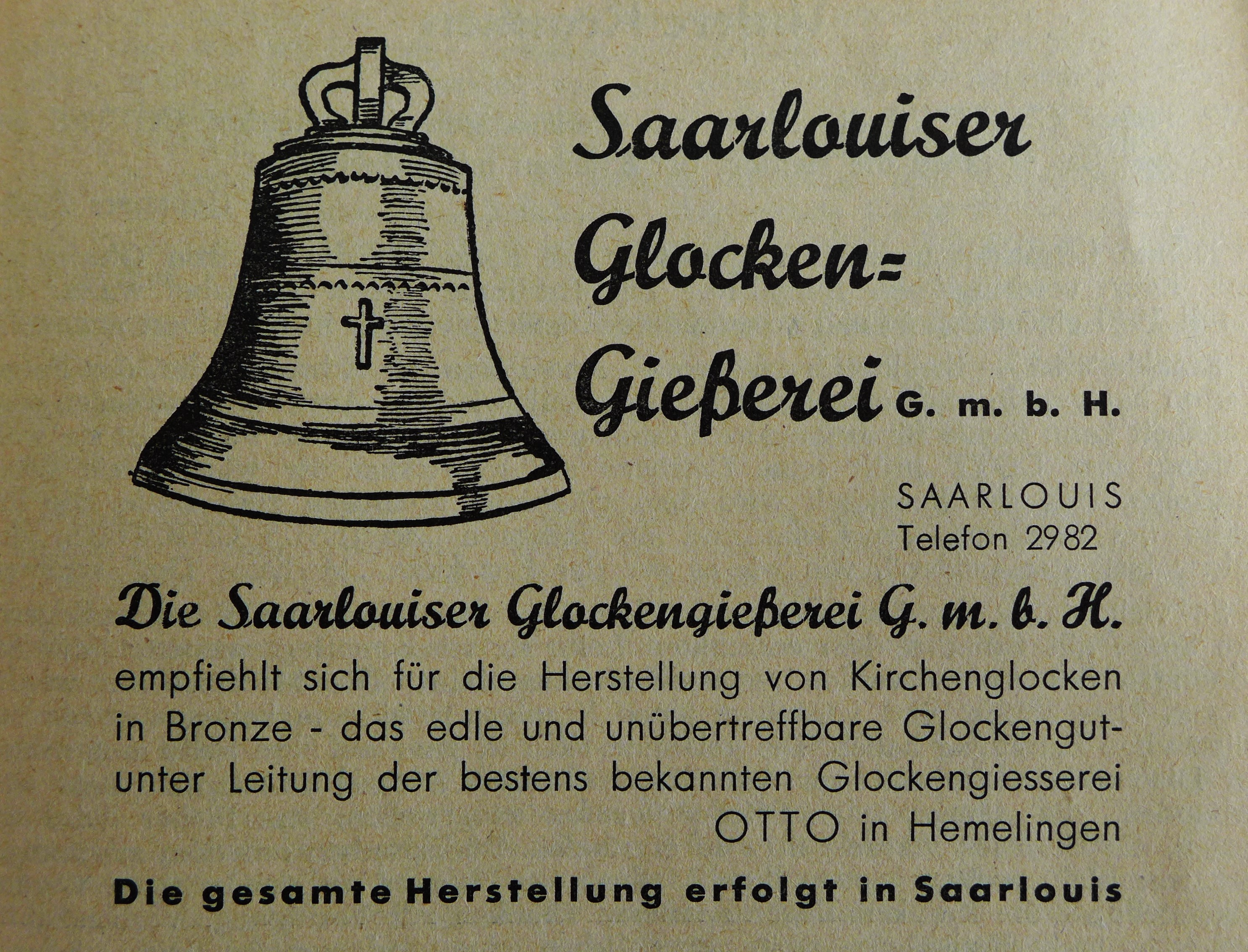 Annonce der Glockengießerei Otto von 1954 (Festschrift zur Einweihung der St. Albert-Kirche in Saarbrücken)